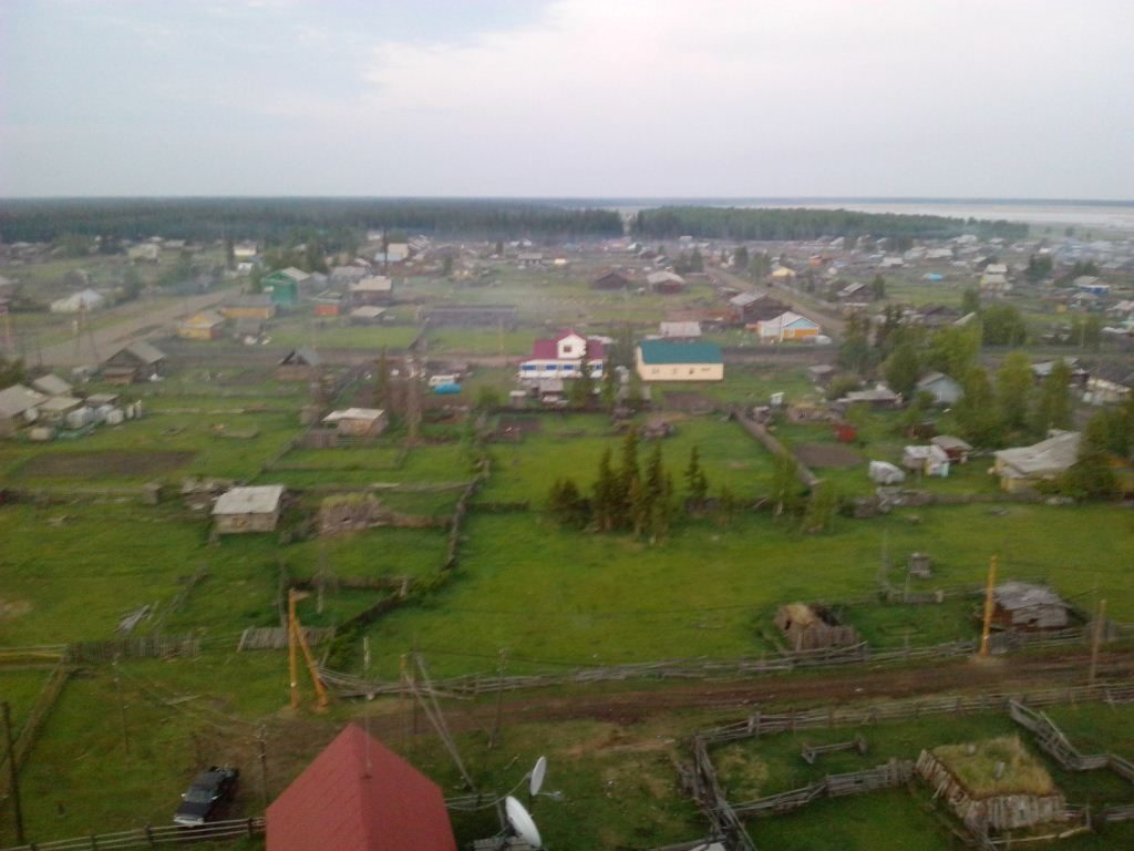 Фото село Тойбохой